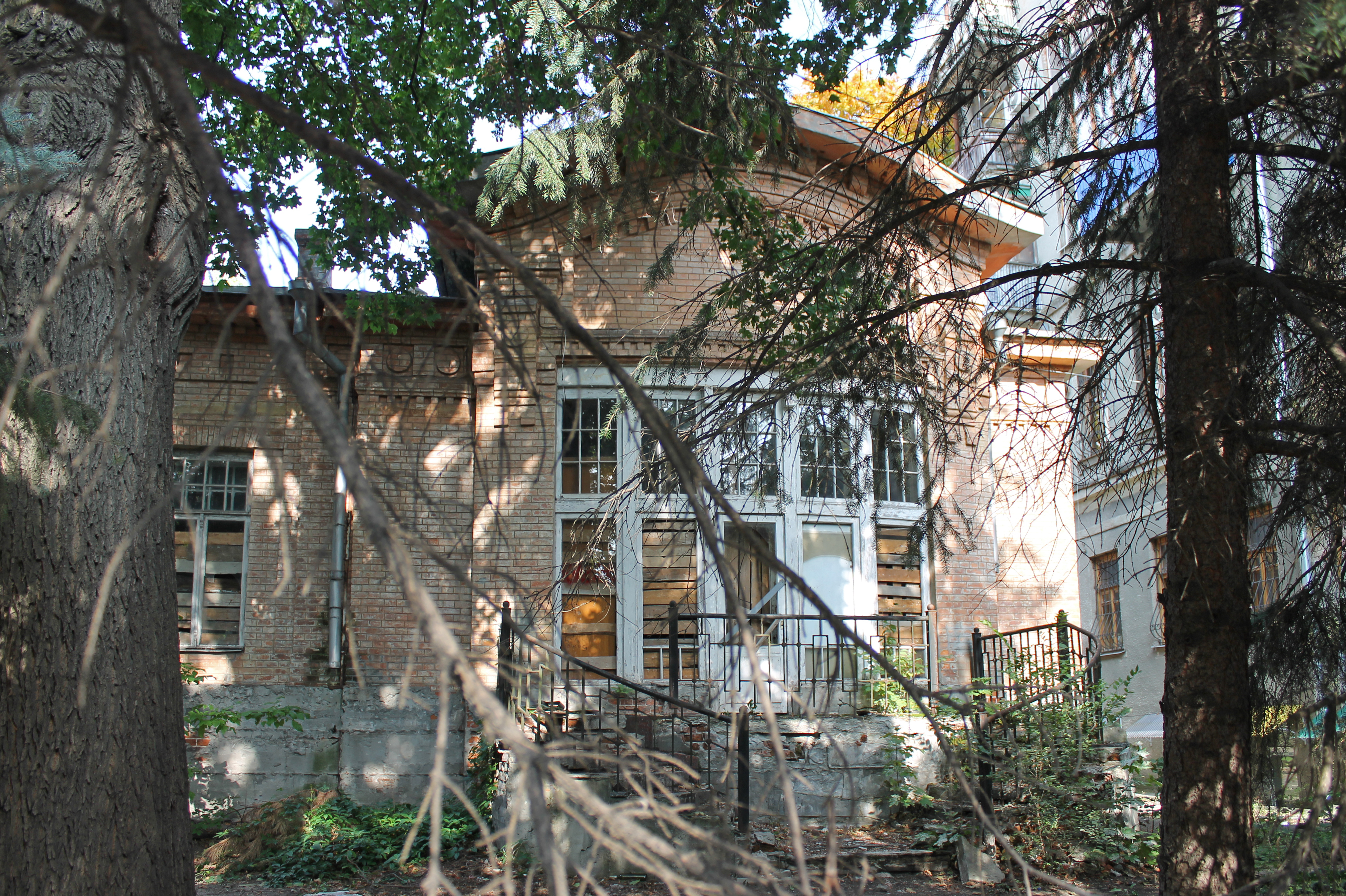 Особняк поч. 20ст., вул. Іванова, 35, м.Харків